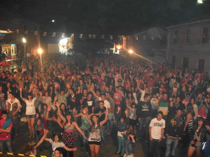 Fotografía realizada en las fiestas de Turcia del año 2012.